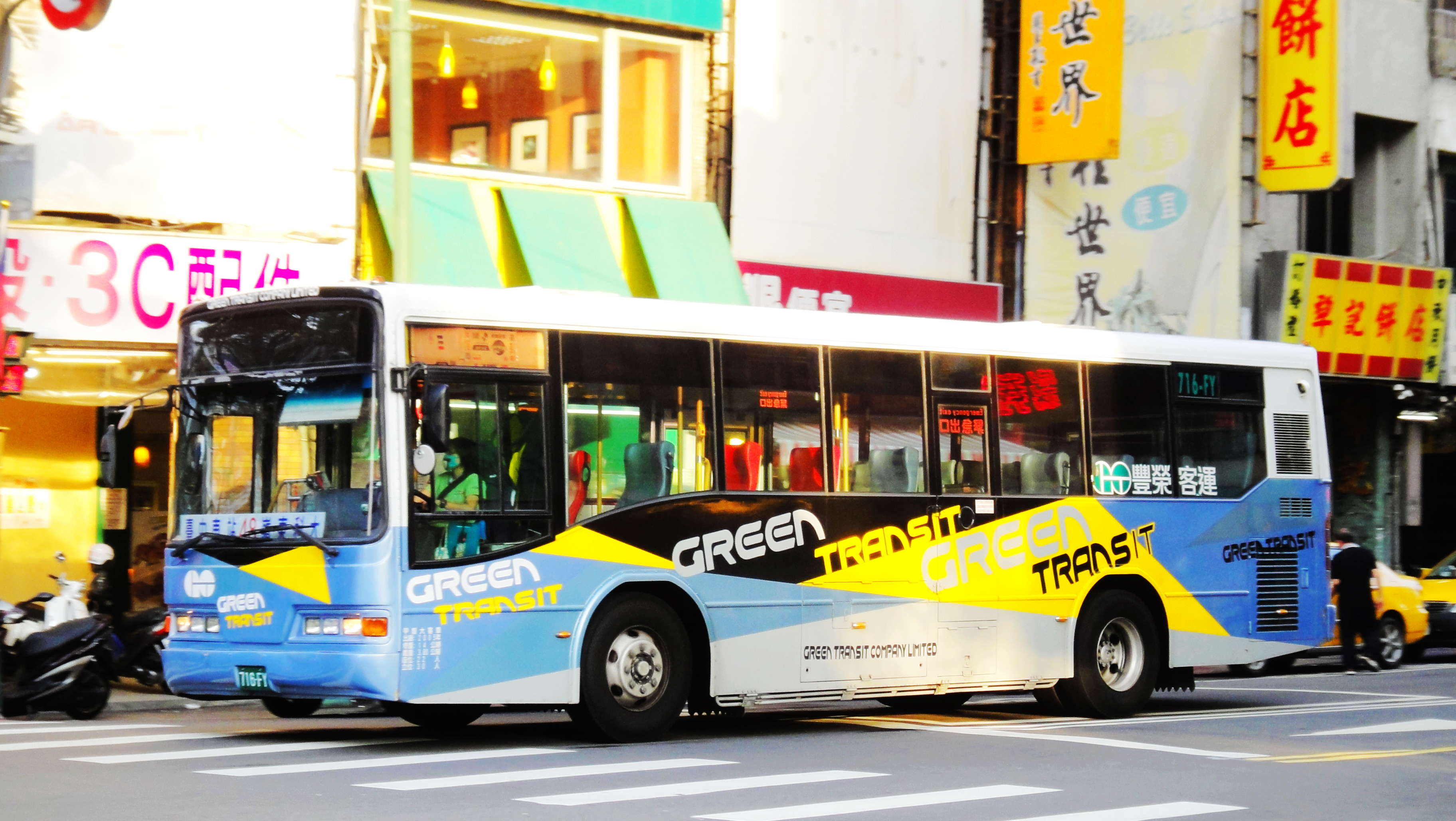 豐榮客運716-FY 台中市公車48路